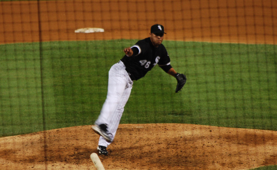 Sergio Santos